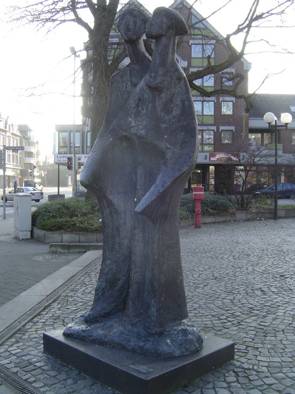 Denkmal der heiligen Ewalde auf dem Aplerbecker Marktplatz, Künstler: Kuno Lange